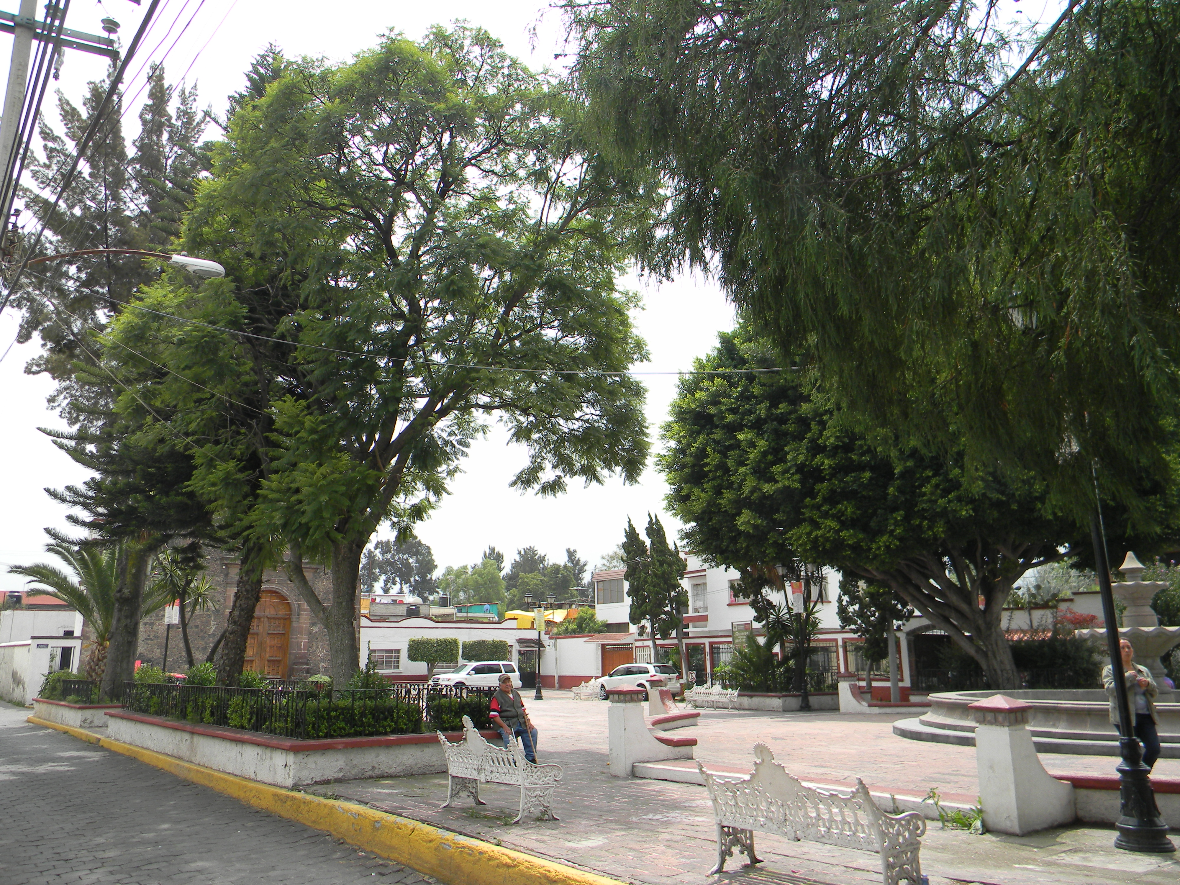 Vista de la plazuela de la Capilla de San Cristóbal donde se aprecia como es la vida cotidiana de los habitantes del barrio de San Cristóbal Xallan, Xochimilco, Ciudad de México.